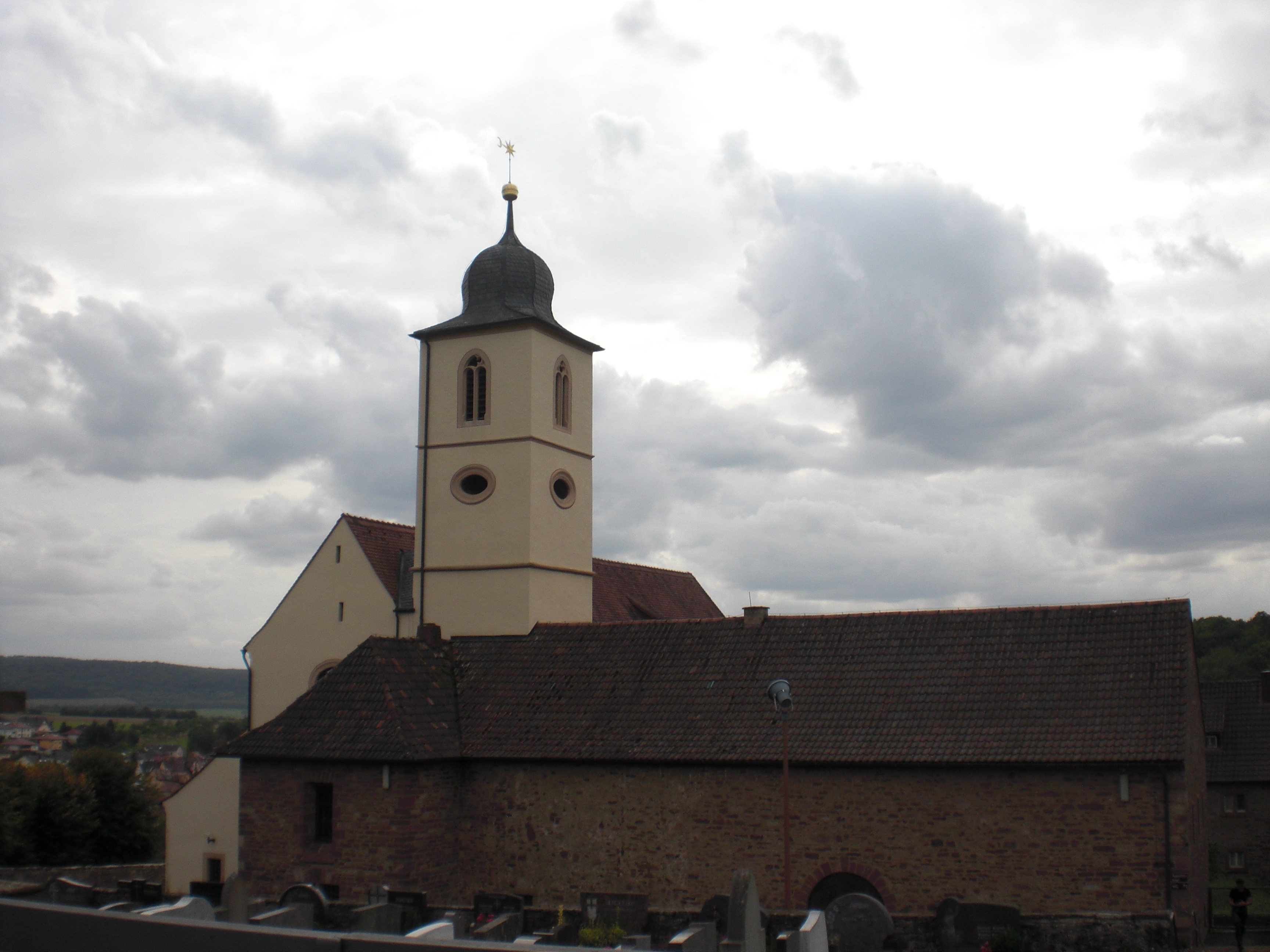 Kloster Aura